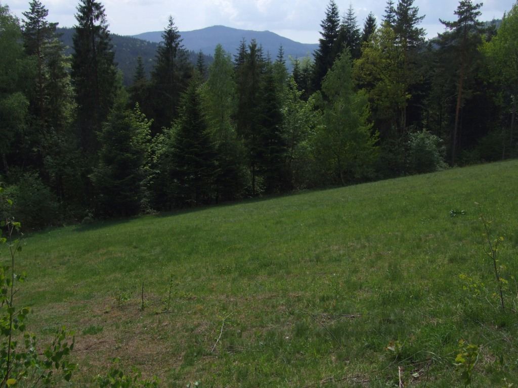 Polana Gładkie Łaziska na Łopieniu (w Słopnicach)